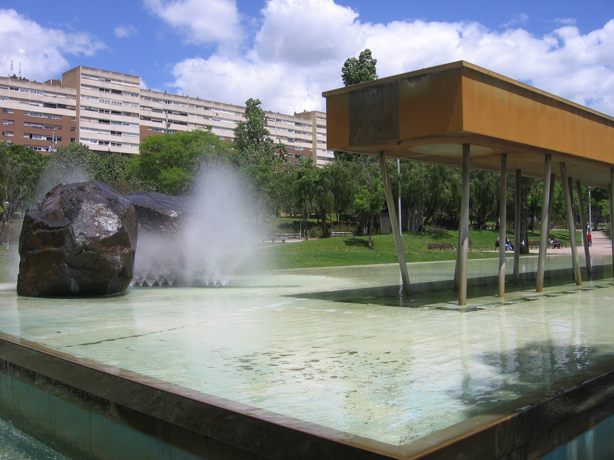 Fuente Manuel de Falla, Parque de Josep Maria Serra Martí.